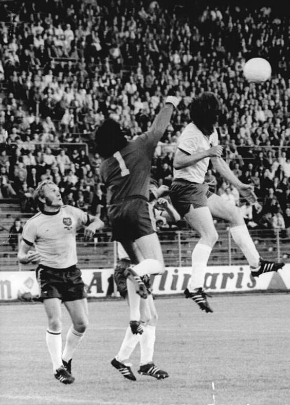 ADN-ZB-Mittelstädt-14.6.74-ma-BRD-Hamburg: X. Fußball-Weltmeisterschaft-1. Finalrunde, Gruppe 1: DDR - Australien 2:0- Faustabwehr durch Australiens Torwart Jack Reilly. Rechts Harald Irmscher (DDR). Links Manfred Schäfer (Australien).